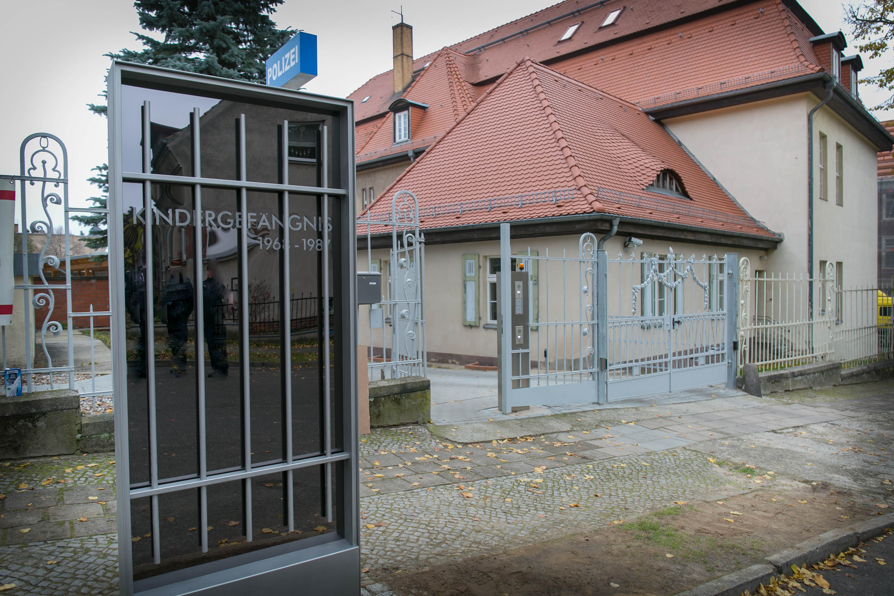 Mahnmal in der Adolf-Bräutigam-Straße 4, Bad Freienwalde (Oder) mit der mit der Aufschrift "Kindergefängnis - Wir werden nie vergessen. Die Kinder"